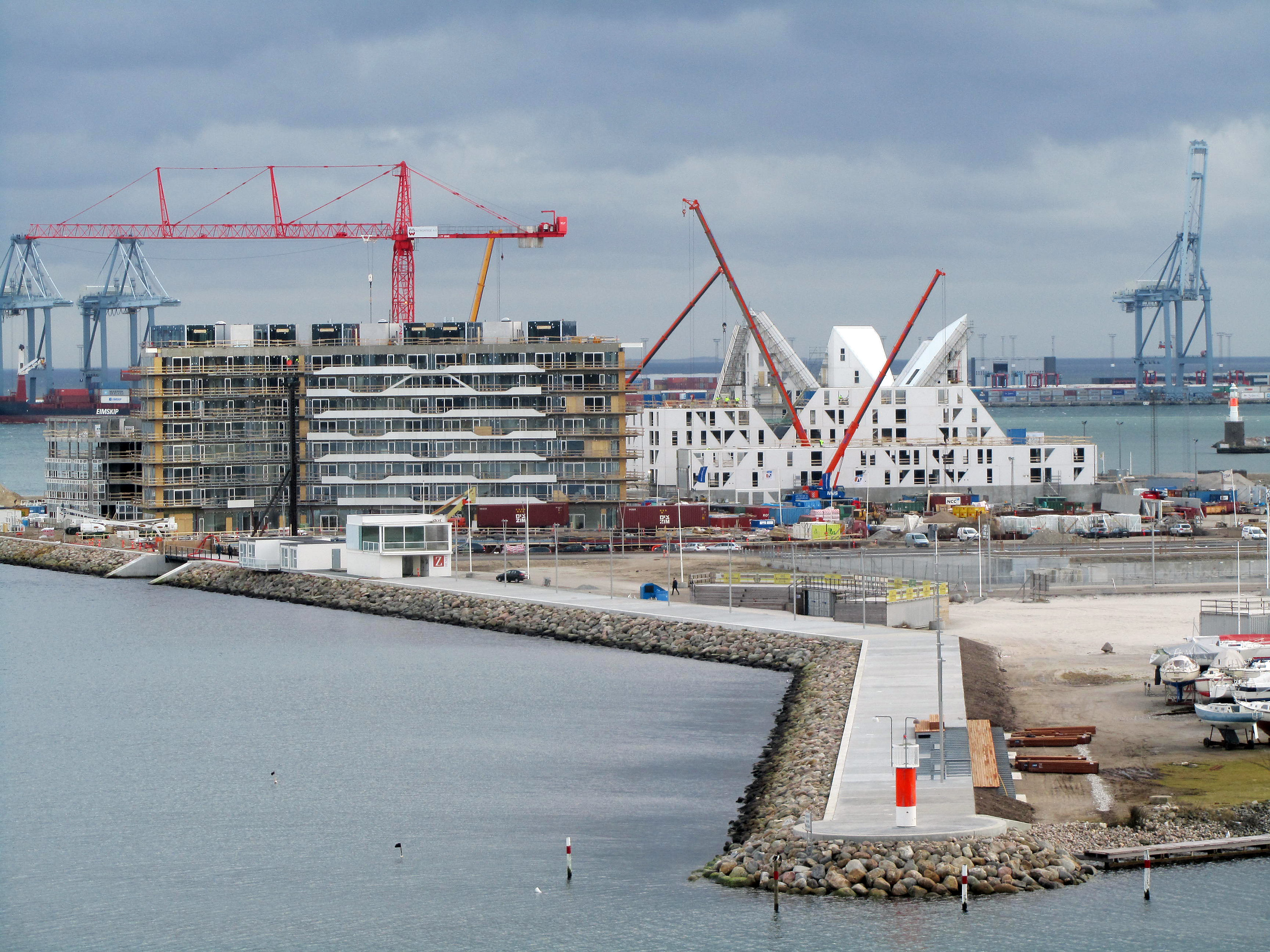 Lighthouse og Isbjerget på Nordhavnen, del af de bynære havnearealer i Aarhus, feb 2012